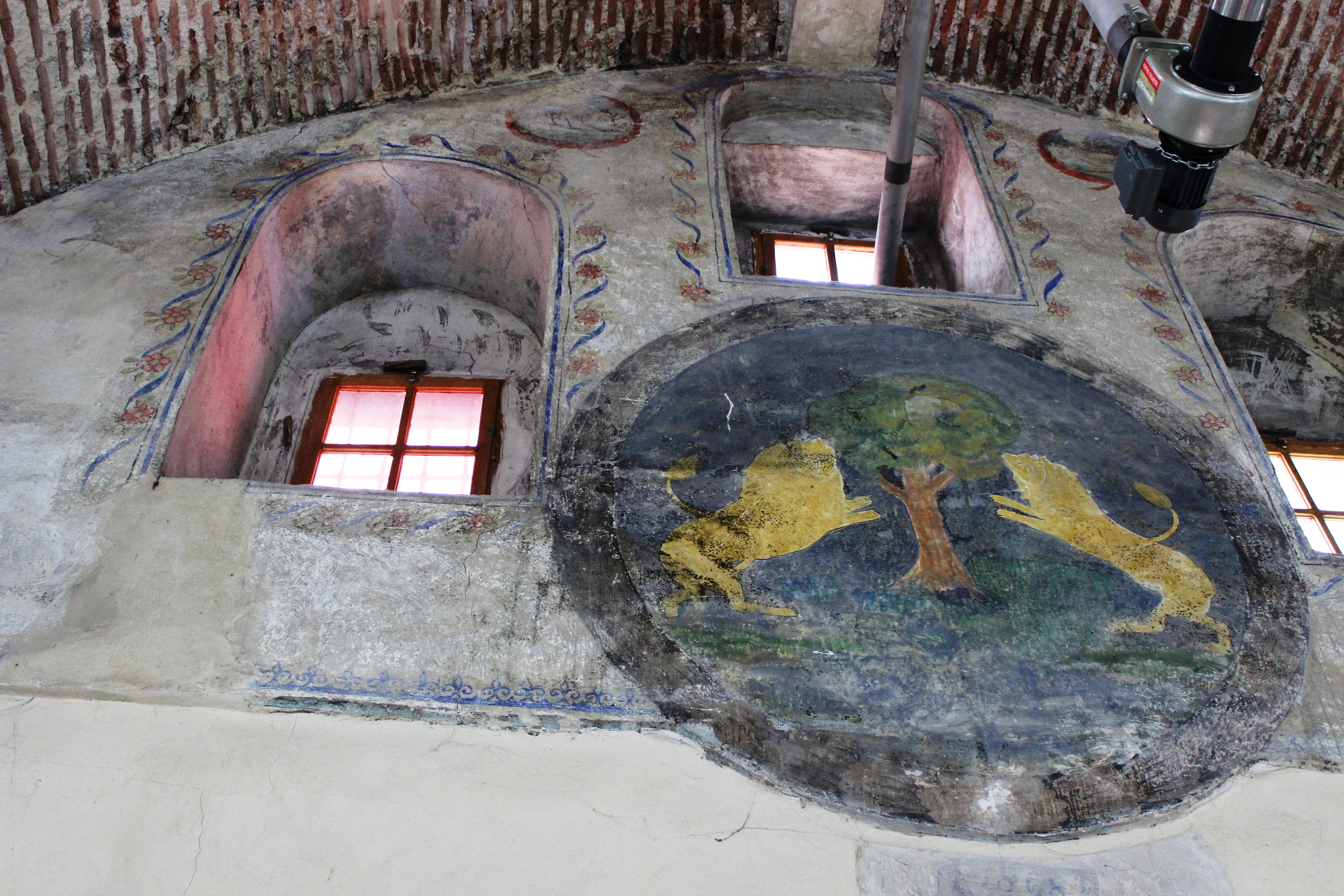 Kütahya büyük bedesten resim